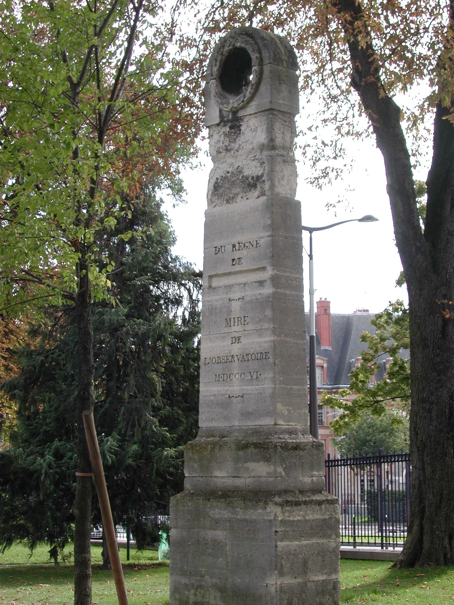 Mire du méridien de Paris, parc Montsouris, Paris, France